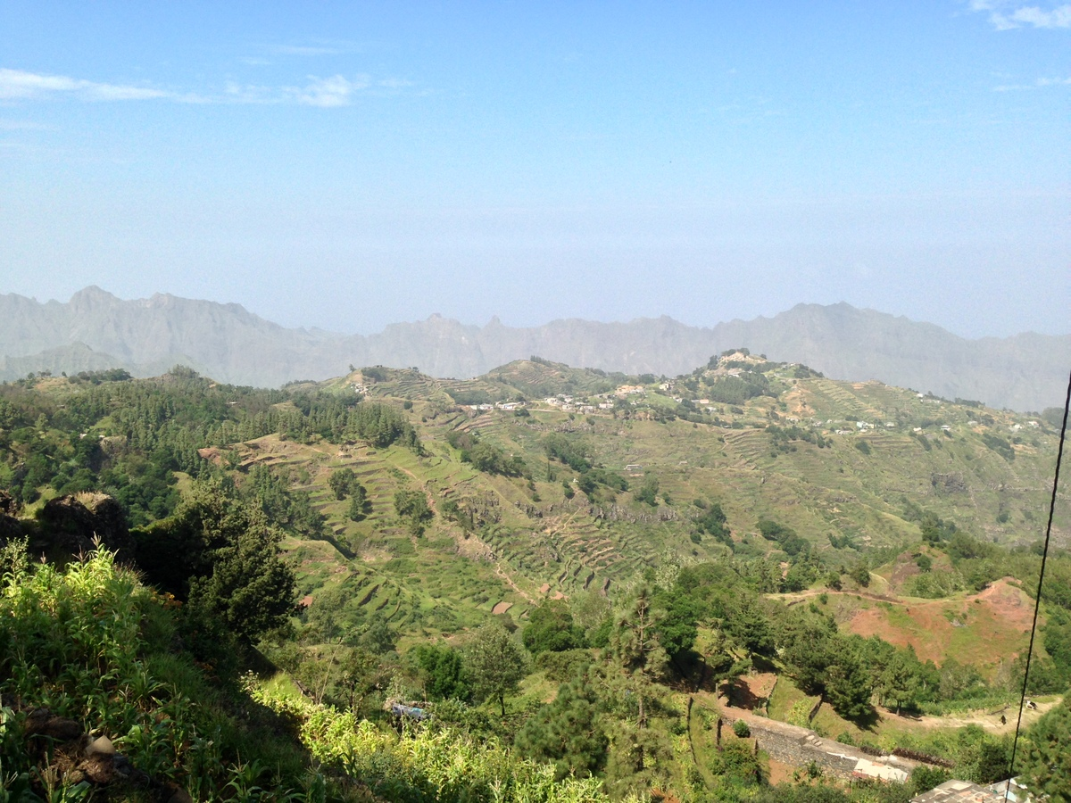 Cabo Verde